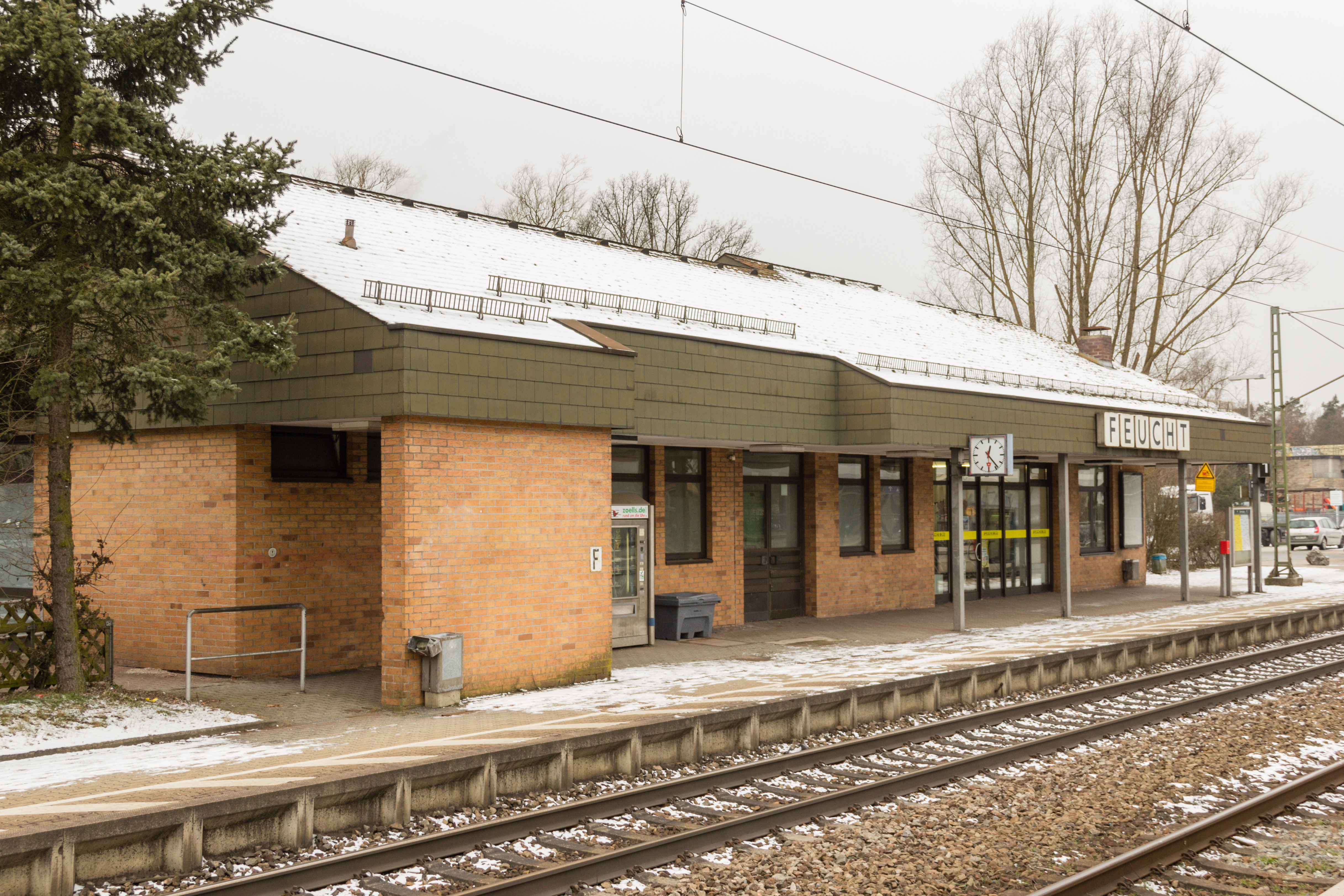 Bahnhof Feucht